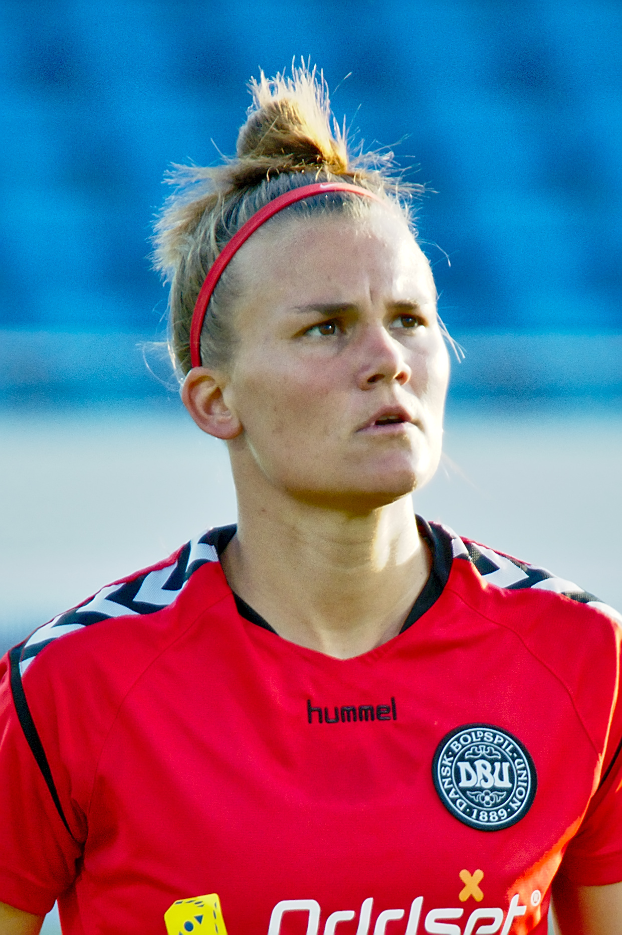 Katrine Veje